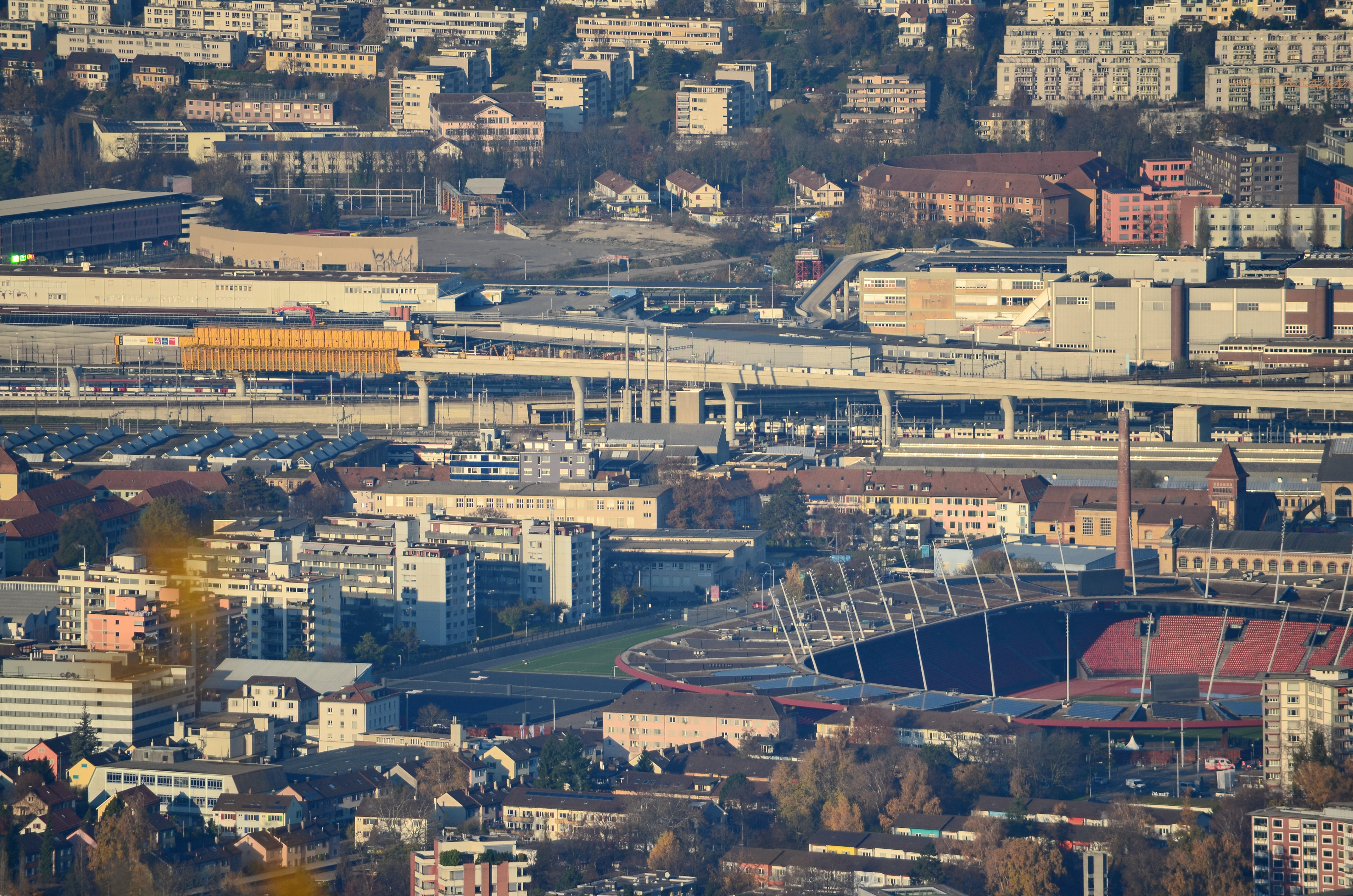 Durchmesserlinie (Letzigrabenbrücke) in Zürich, Ansicht vom Uetliberg